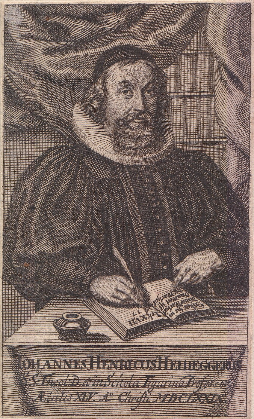 zeitgenössisches Kupferstich Portrait Johann Heinrich Heidegger (1633 - 1698) mit 45 Jahren